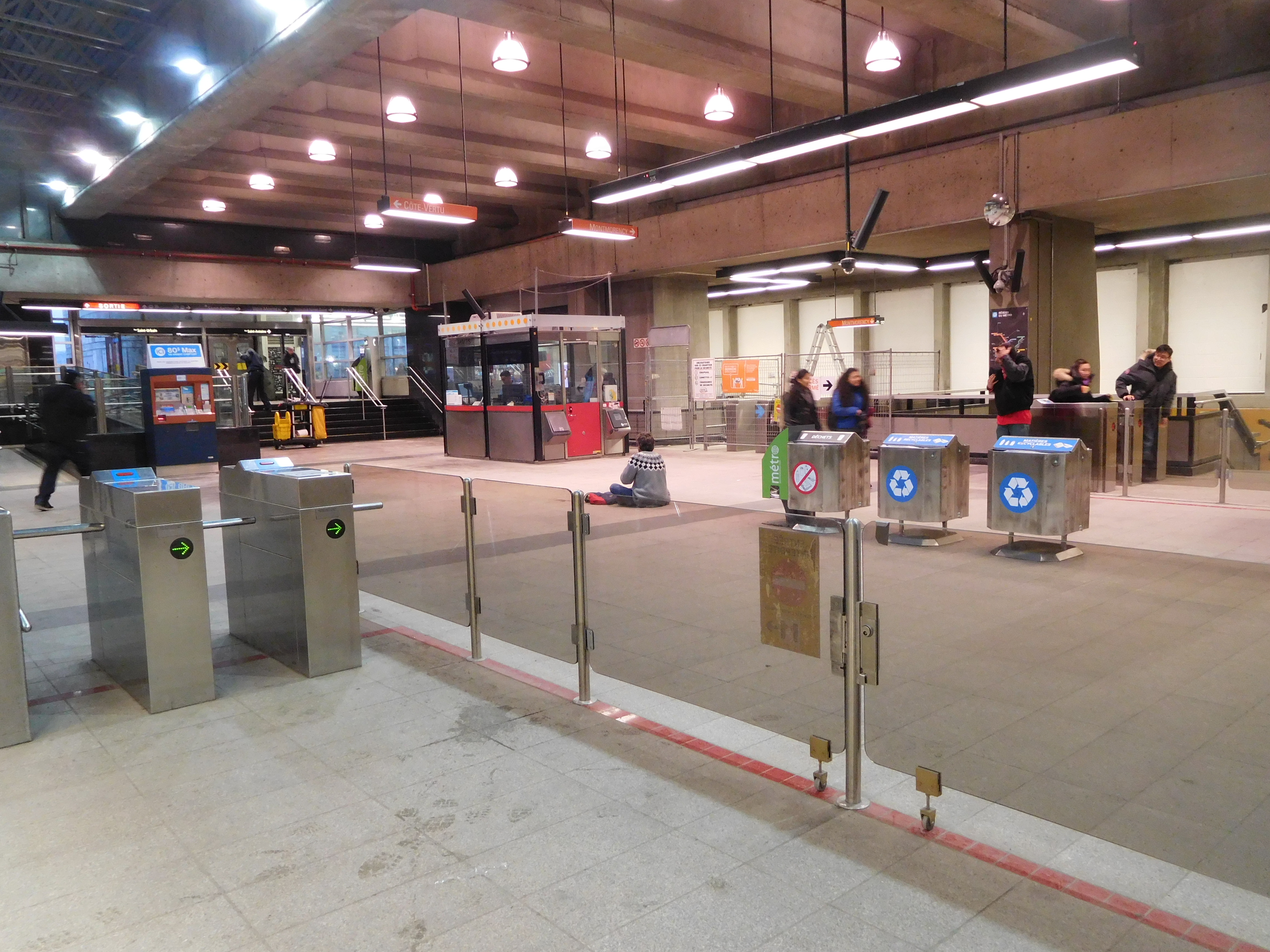 Station de métro Place-d'Armes, Montréal